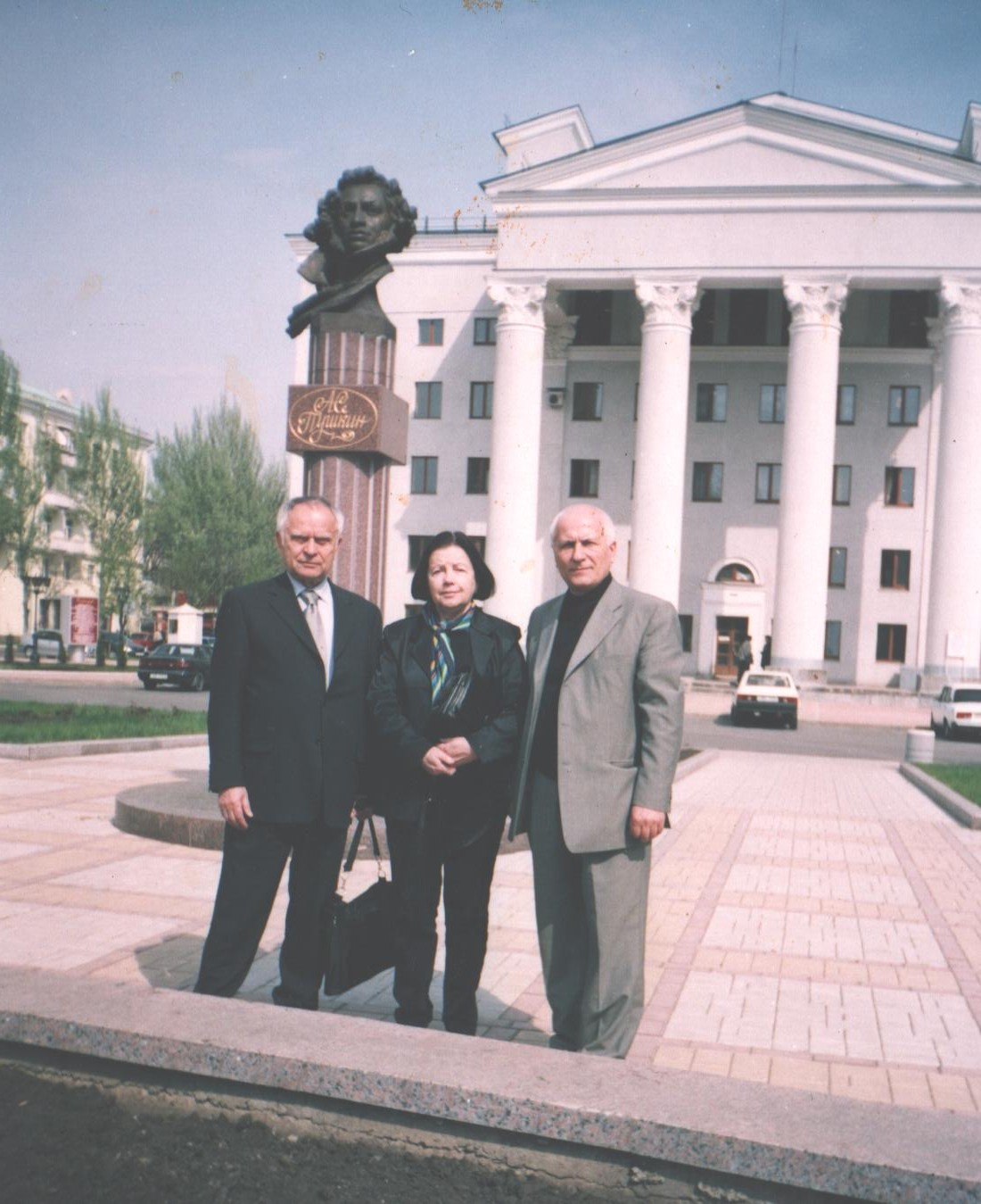 Фото